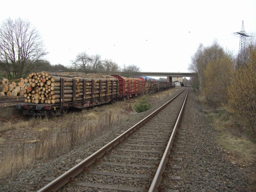 Holzverladegleis Niederjossa. Im Hintergrund: Brücke der BAB7 und ehem. Bahnhof